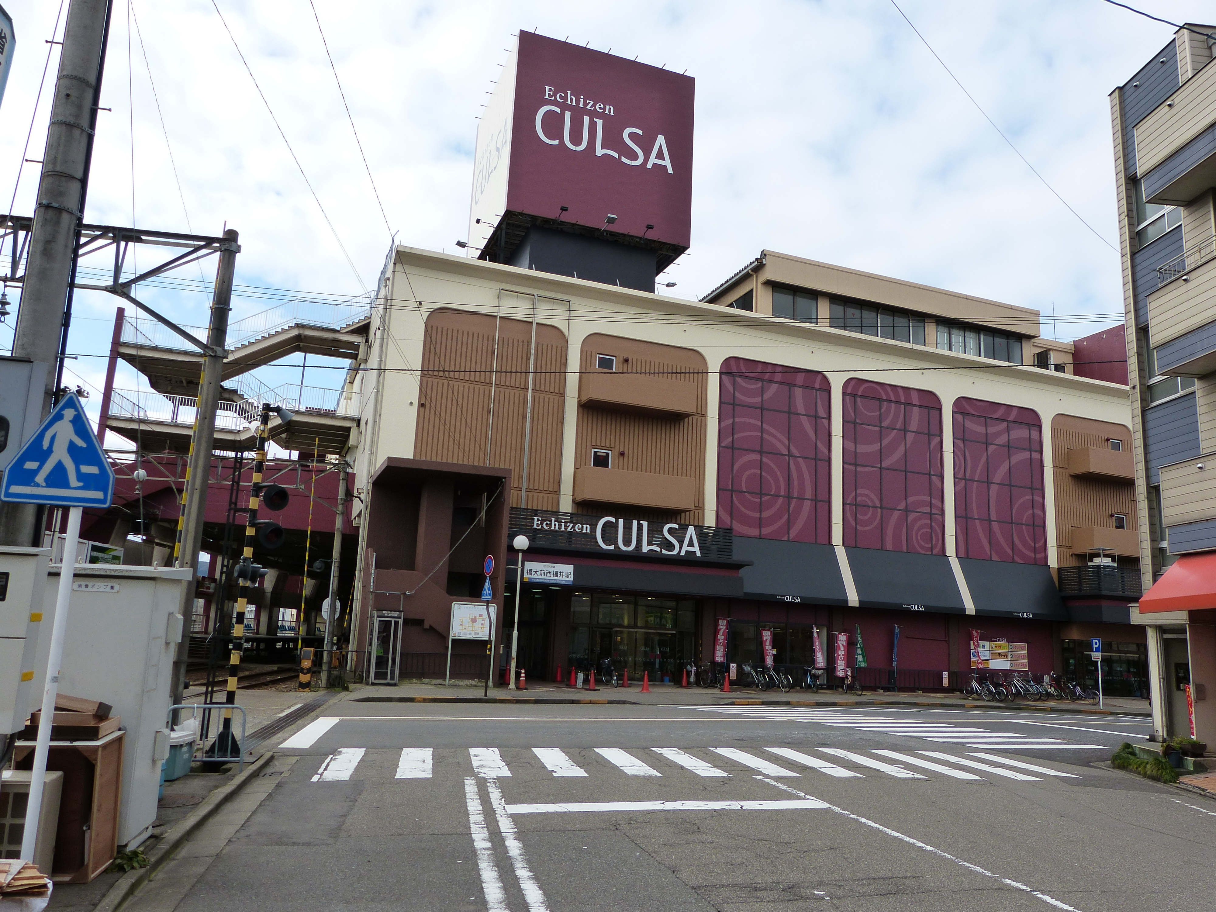 えちぜん鉄道福大前西福井駅と一体となっている駅ビル。